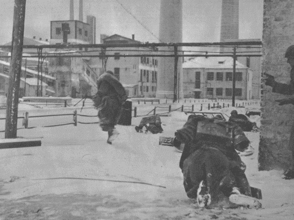 Ucraina, 2 novembre 1941, uomini del C.S.I.R. all'attacco di Gorlowka